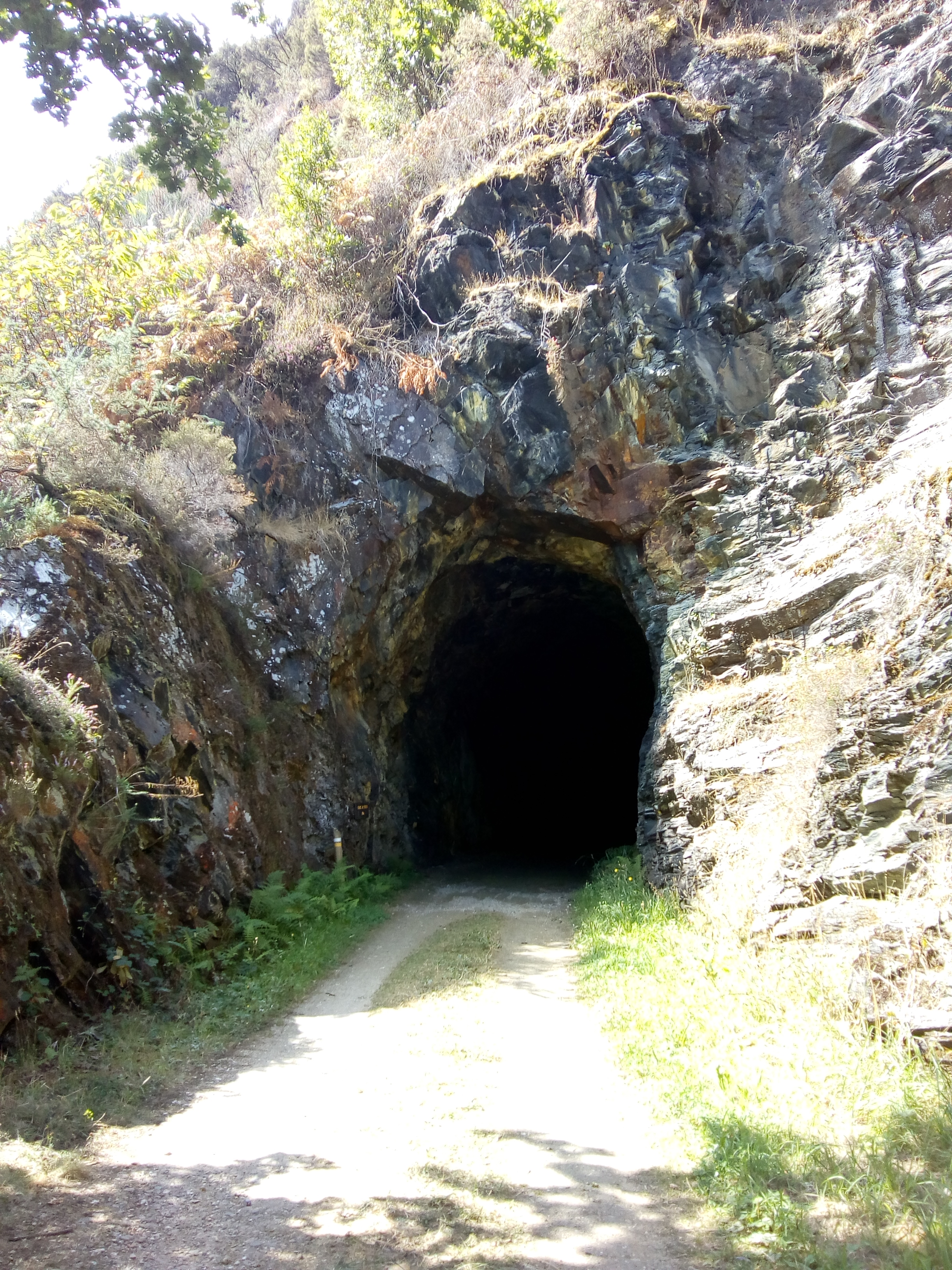 Túnel da volta na ruta da antiga vía do ferrocarril Vilaoudriz - Ribadeo